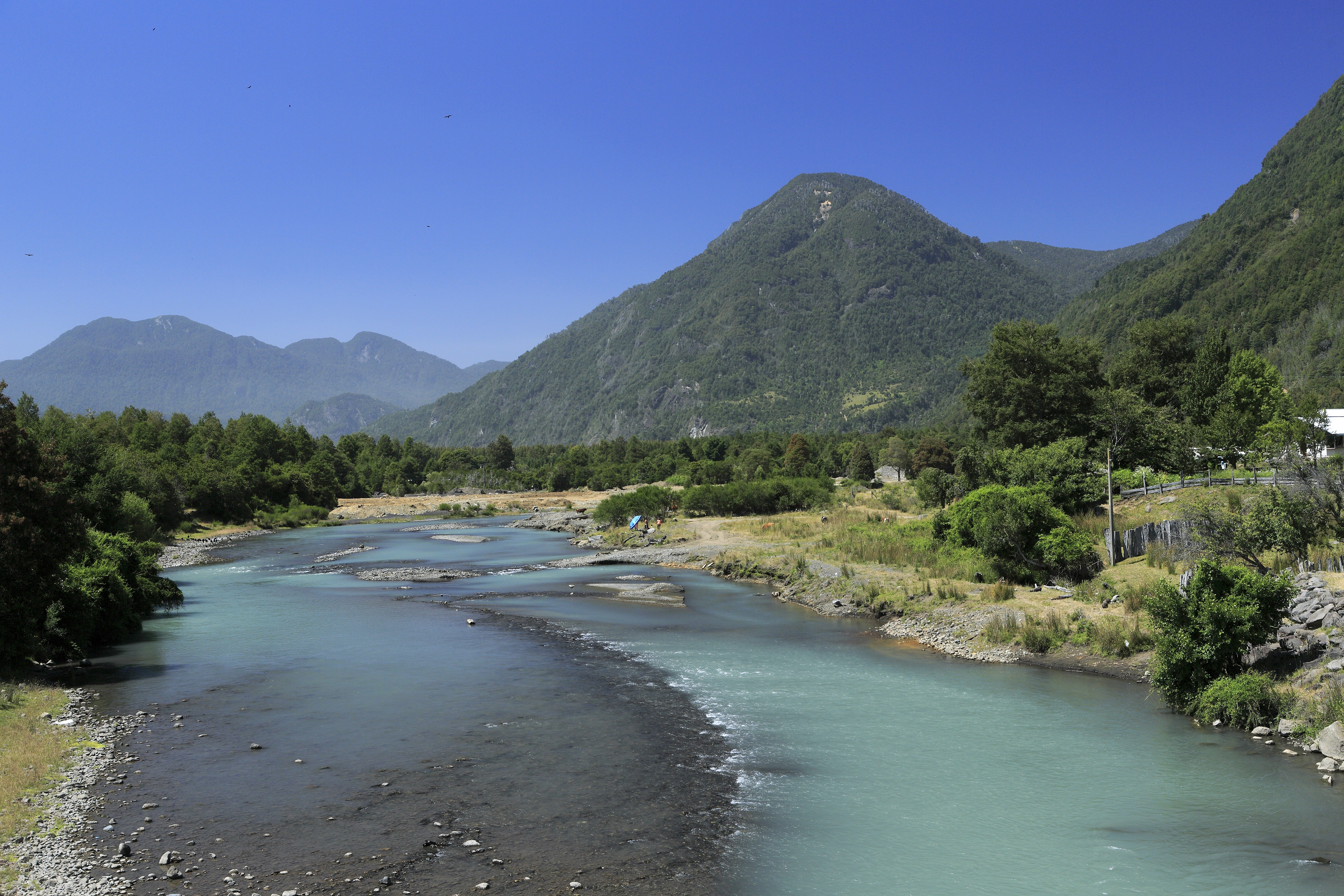 Von der Brücke der Straße 201-CH stromauf kurz vor der Mündung in den Lago Calafquén, der Fluss nimmt etwa zwei Kilometer weiter oben zusätzlich den Abfluss des Lago Pellaifa auf